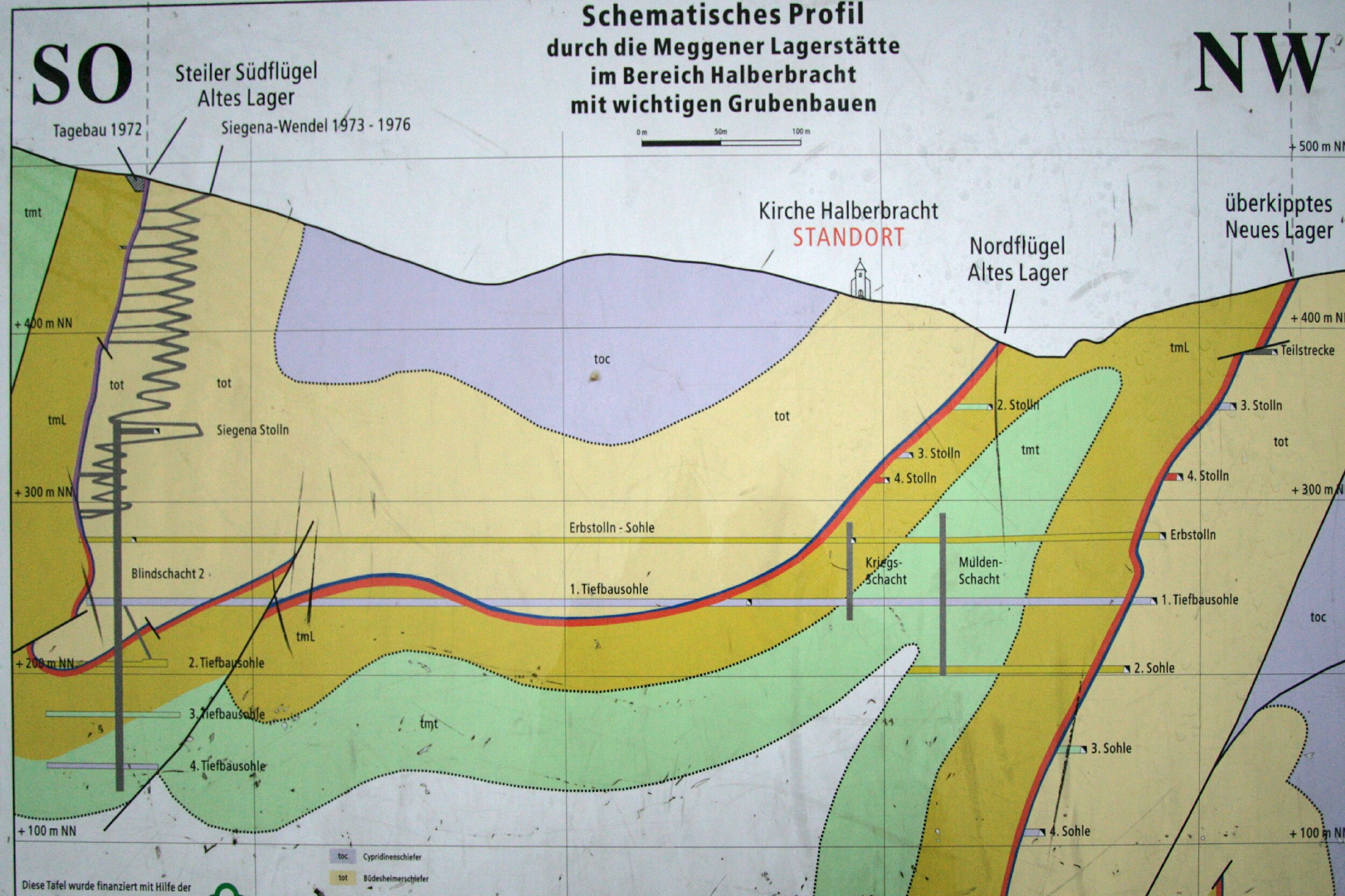 Schematisches Profil durch die Meggener Lagerstätte, Schautafel vor der Kirche Halberbracht